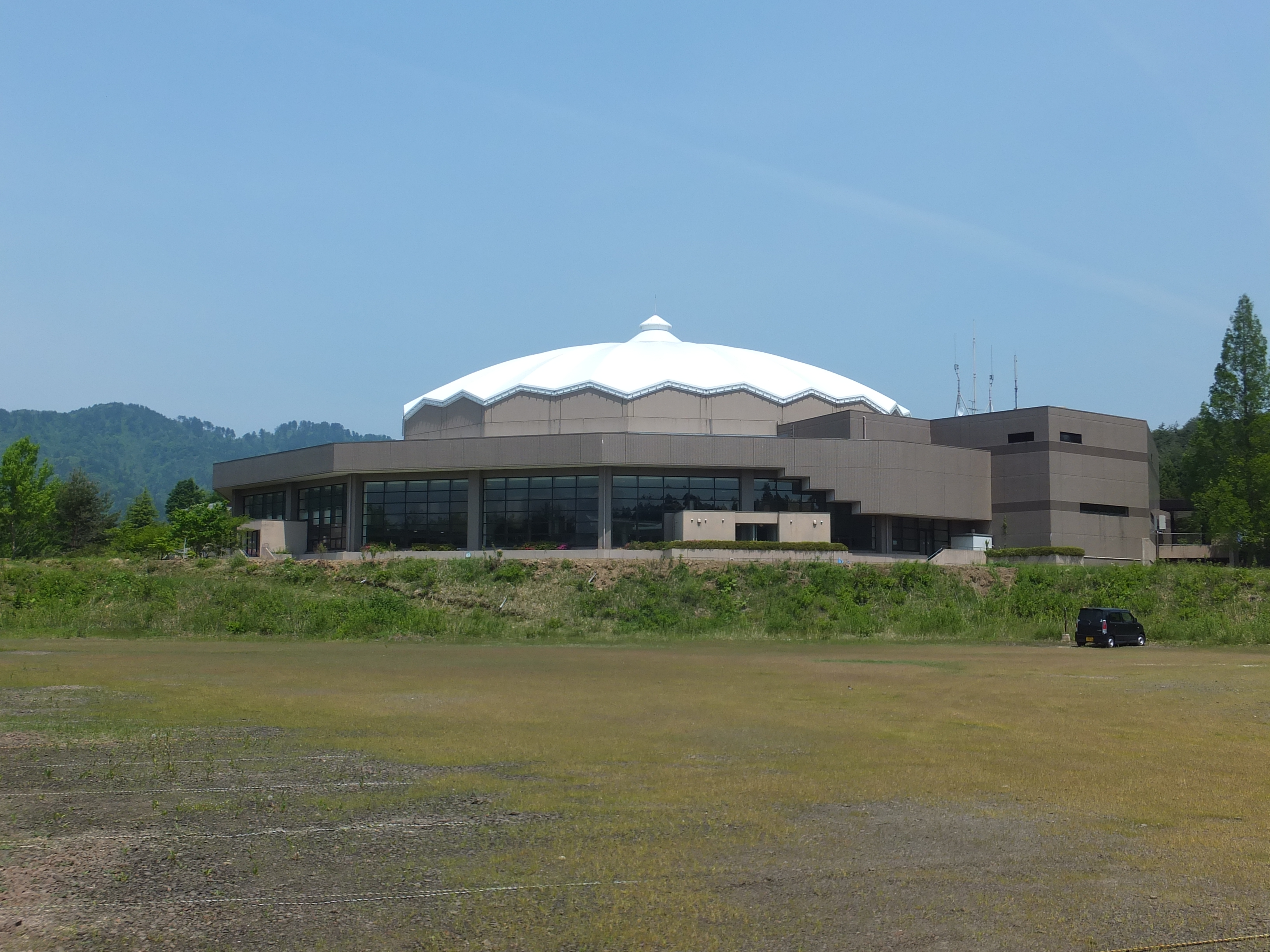 太平山リゾート公園内にある屋内プール・温泉施設「クアドーム ザ・ブーン」。1991年竣工、1997年増築